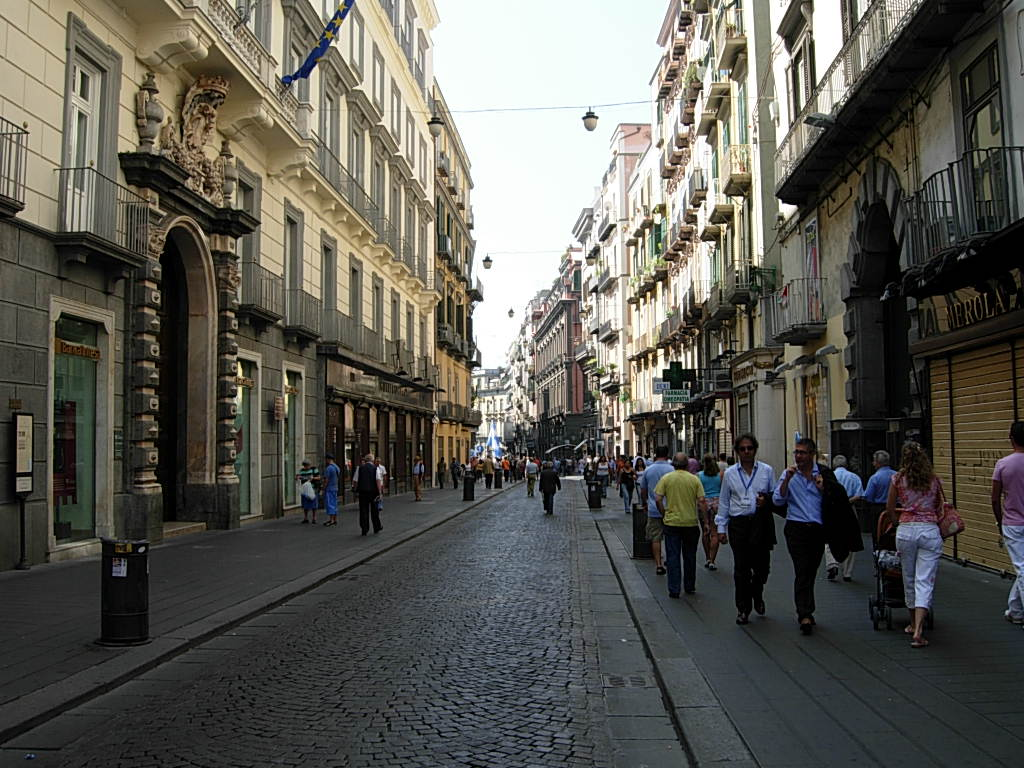 Via Toledo in Napoli Foto personale concessa in PD